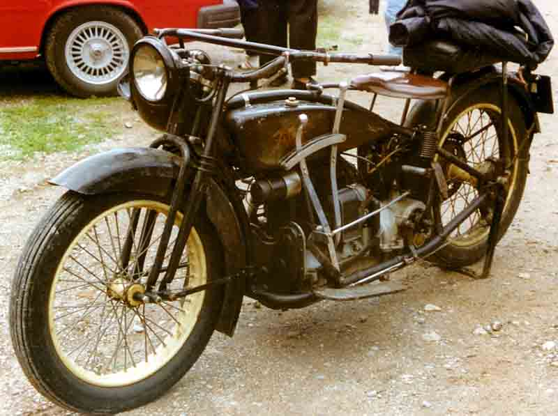 ACE